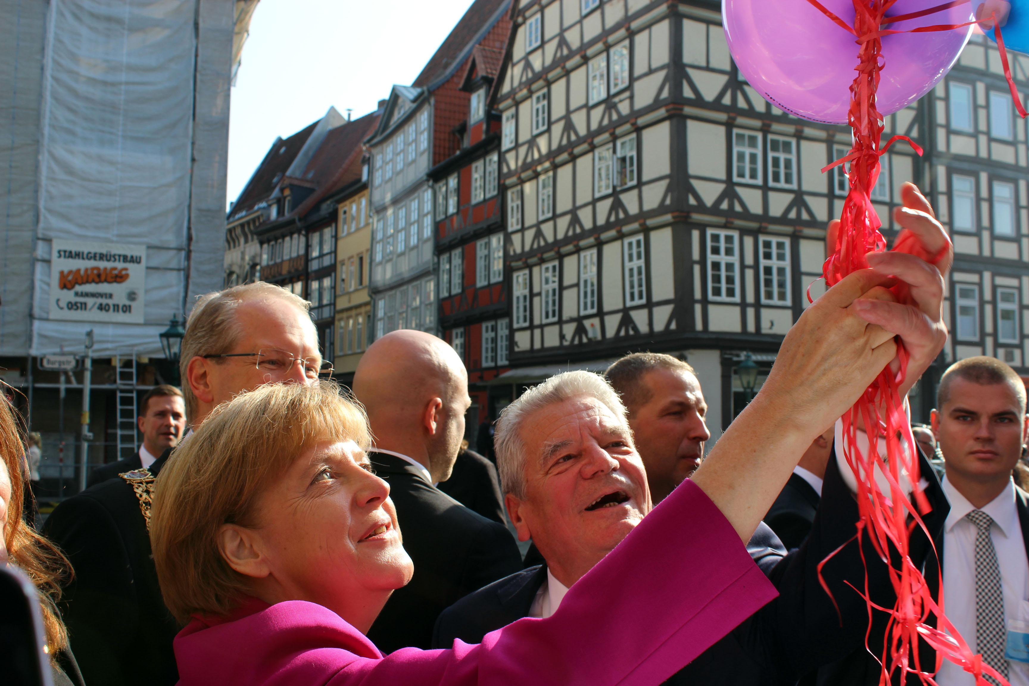 Am Tag der Deutschen Einheit, der schon am Vortag des 3. Oktobers 2014 in Hannover mit einem großen Fest unter dem Motto "Einheit in Vielheit" im Maschpark hinter dem Neuen Rathaus der niedersächischen Landeshauptstadt und am Maschsee vorab gefeiert wurde, überbrachten Gil Maria Koebberling vom Freundeskreis Hannover und Fred Jaugstetter vom hannoverschen Verein Mentor – Die Leselernhelfer der Bundeskanzlerin Angela Merkel und dem Bundespräsidenten Joachim Gauck einen bunten "Strauß" Luftballons mit den Aufschriften "Willkommen in der EXPO-Stadt Hannover" und "Wir lieben Hannover" ...